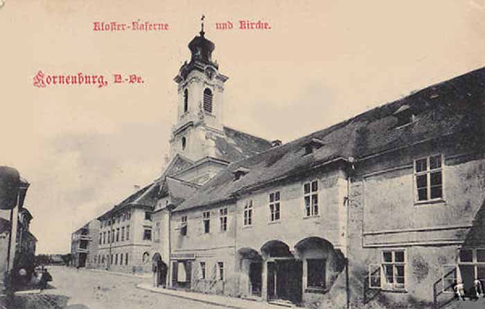 Kloster Kaserne des Telegraphen Regiments in Korneuburg